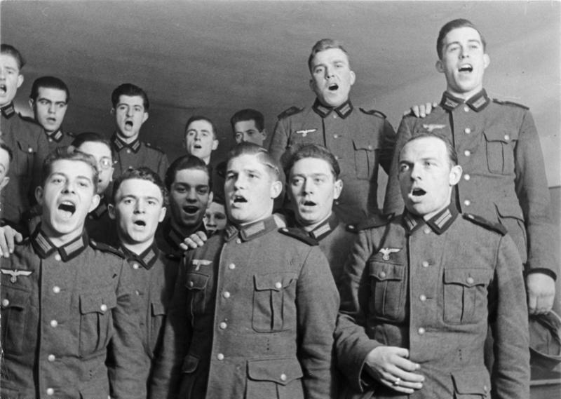 Innsbruck Junge Südtiroler Umsiedler als Soldaten